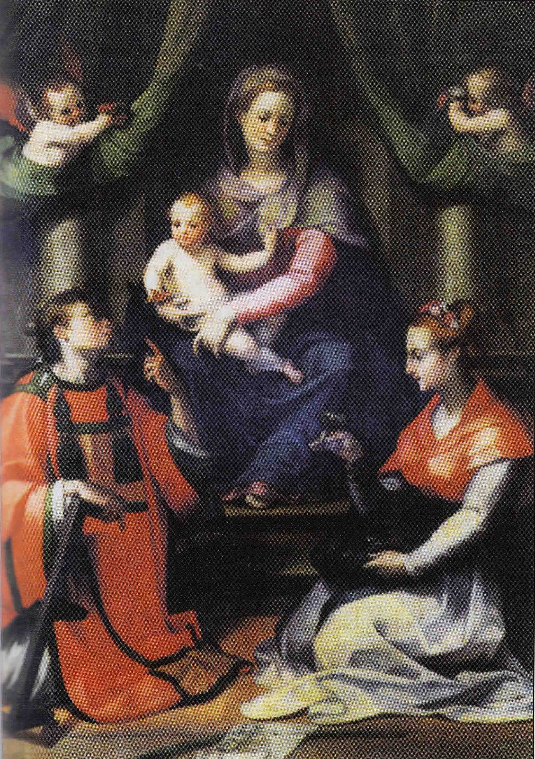 Madonna in trono tra i santi cecilia e lorenzo